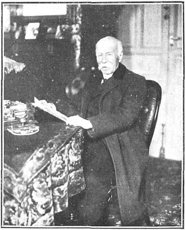 D. José Morer. Profesor de matemáticas que fué de Echegaray cuando éste comenzó a estudiar la carrera de ingeniero. (FOT. NUEVO MUNDO POR CAMPÚA).